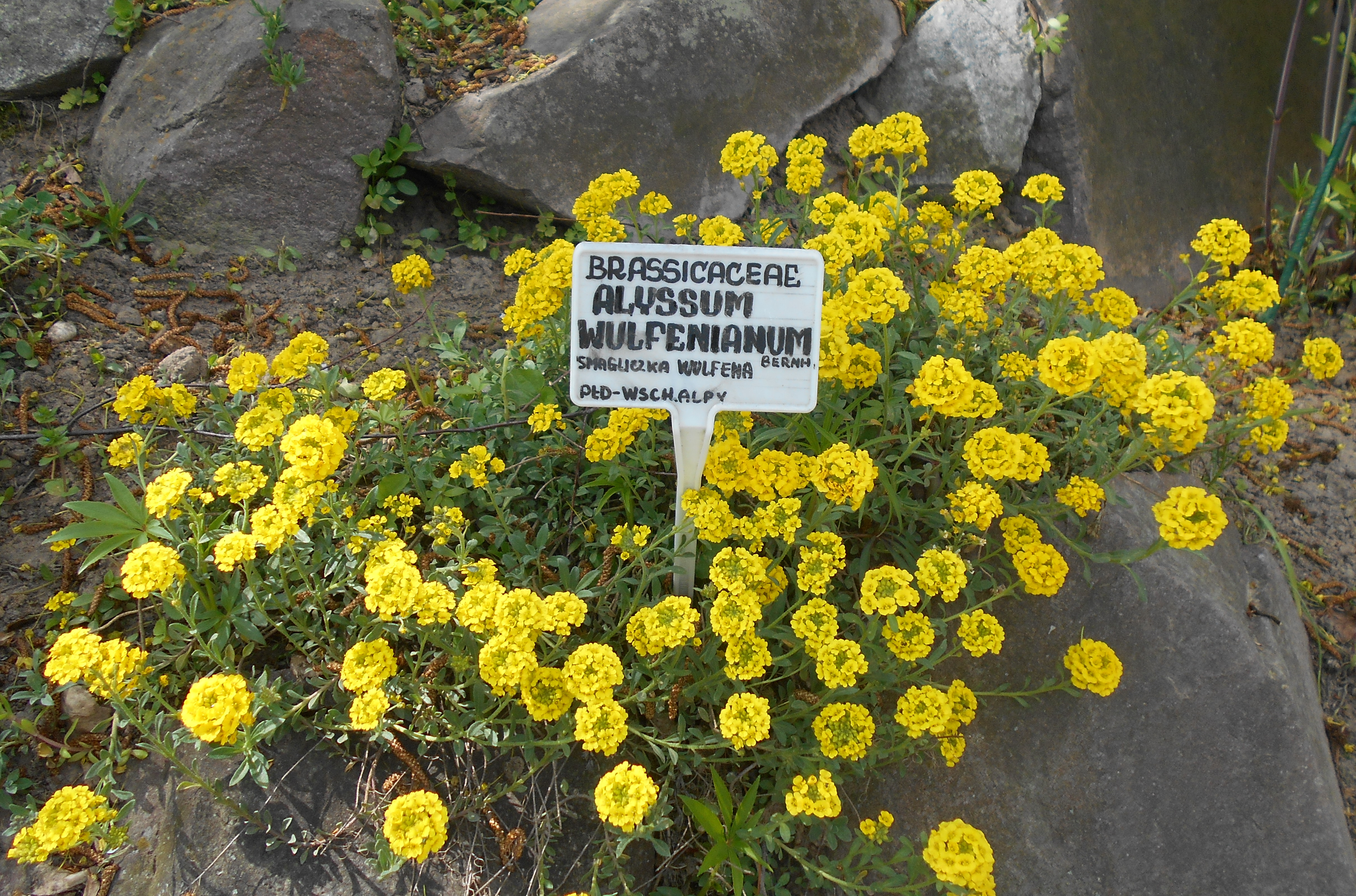 Smagliczka Wulfena (Alyssum wulfenianum), Ogród Botaniczny UMCS w Lublinie.